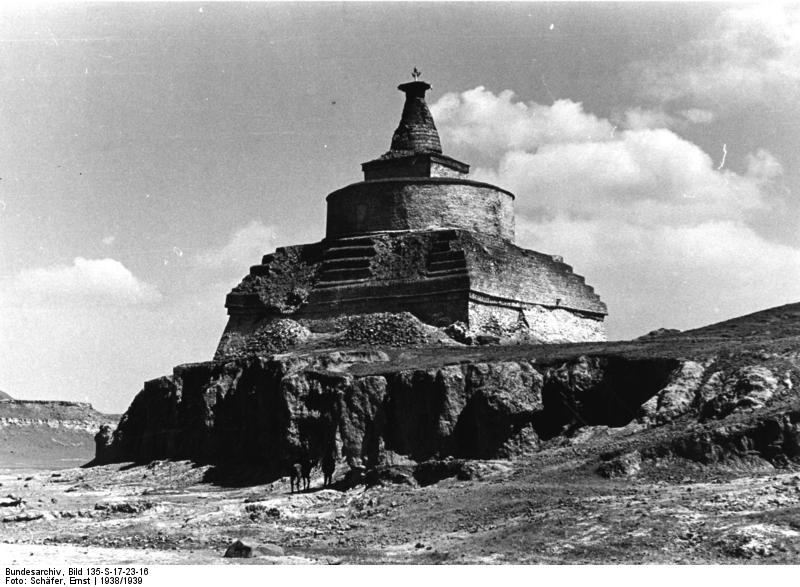 Schigatse, Tschorten